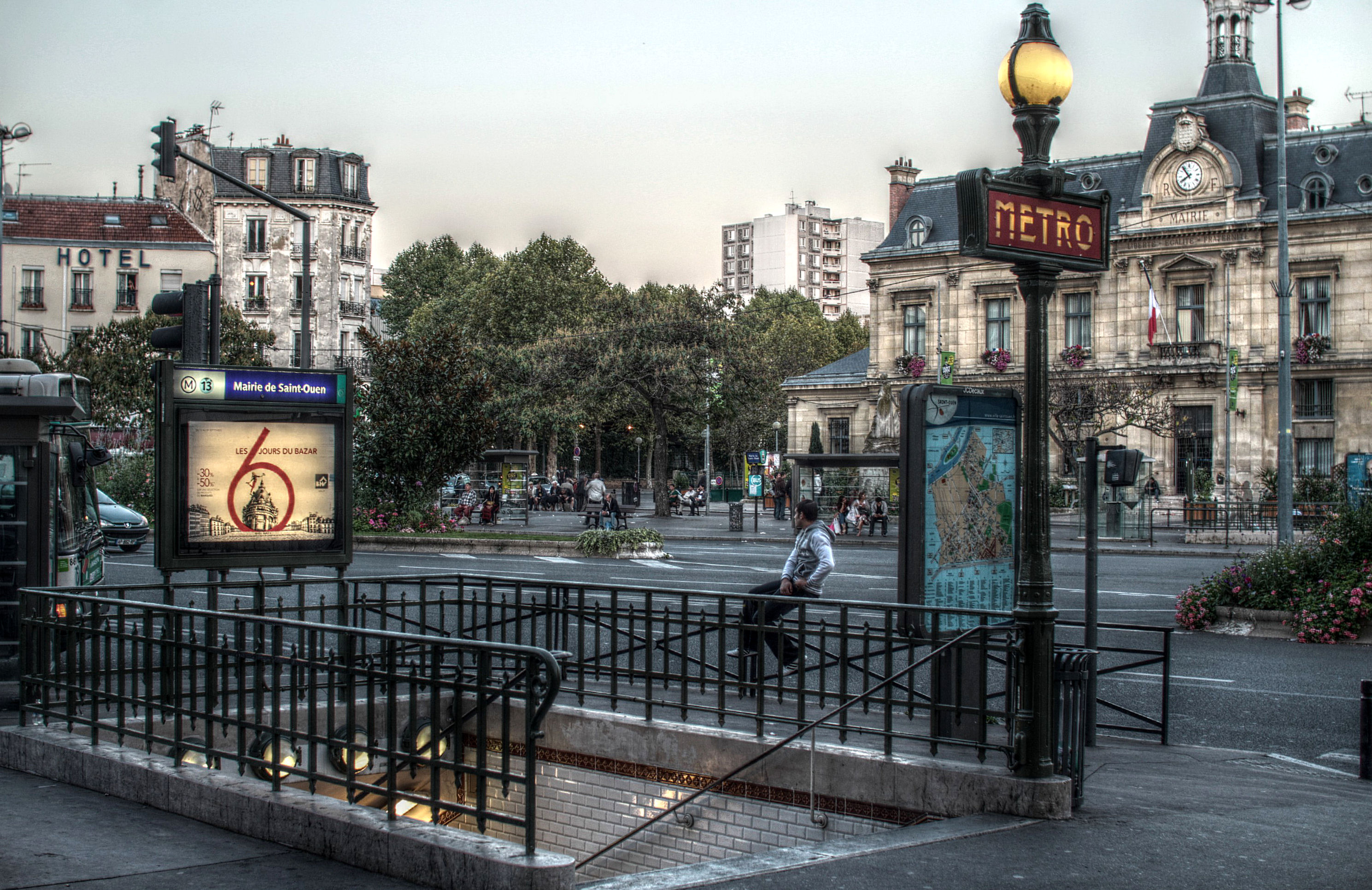 Entrée de la station Mairie de Saint-Ouen du métro de Paris.